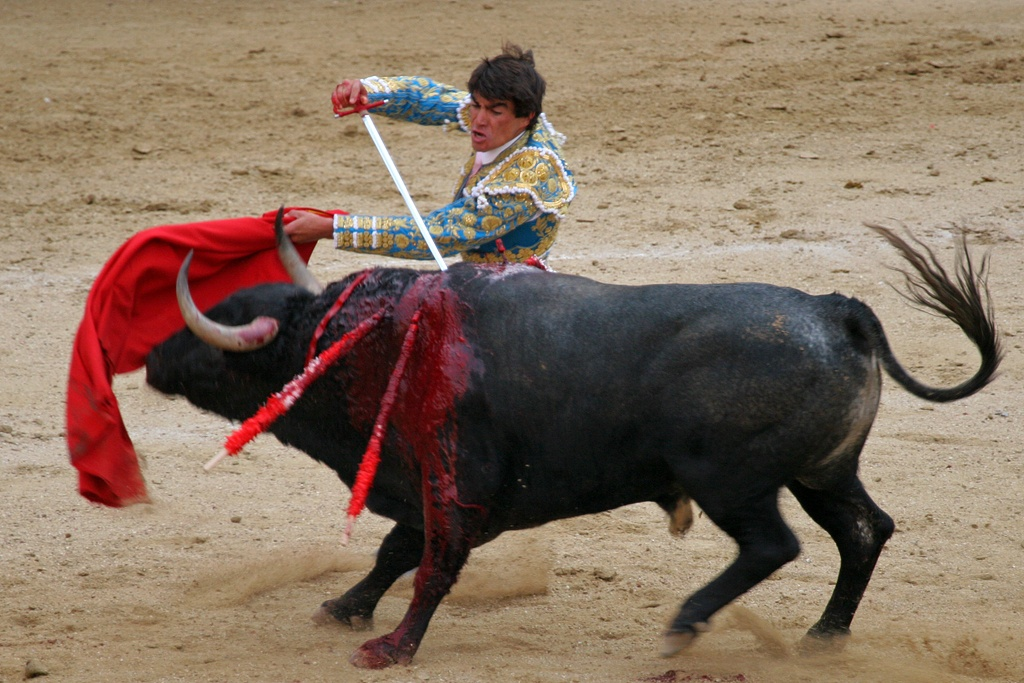 Matador zabija byka